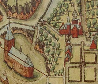 Maasland, Zuid-Holland, tussen 1530-1590. Afgebeeld naast de Oude Kerk de Commandeurshof